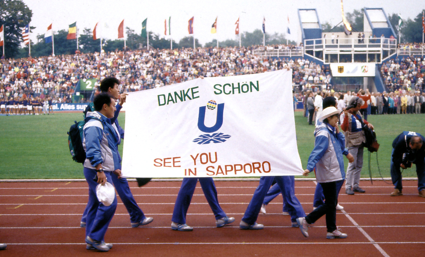 Universiade Duisburg 89